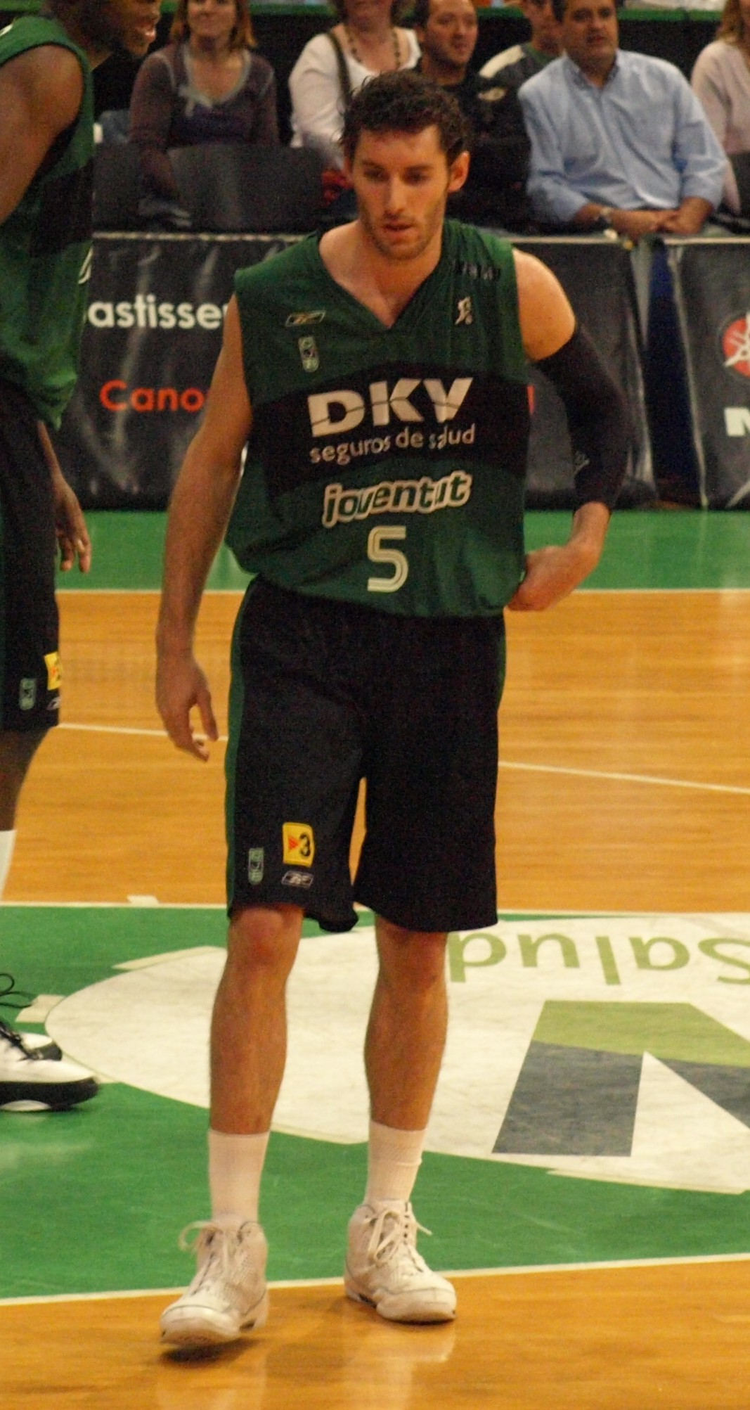 Rudy Fernández con la camiseta del DKV Joventut durante la disputa del 3er partido de los cuartos de final de los play-offs de la liga ACB 2007-08 en el Pabellón Olímpico de Badalona